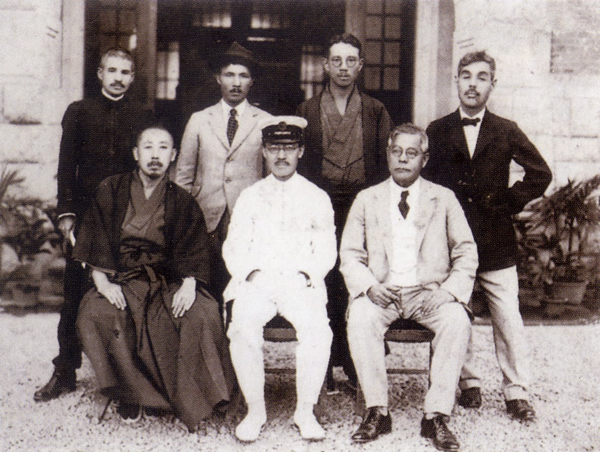 第二回臺灣美術展覽會審查員合照；前排右：小林萬吾(Kobayashi Mango)、左：松林桂月(Matsubayashi Keigetsu)，後排右起石川欽一郎(Ishikawa Kinichirou)、木下靜涯(Kinoshita Seigai)、塩月桃甫、鄉原古統(Gouhara Kotou)。